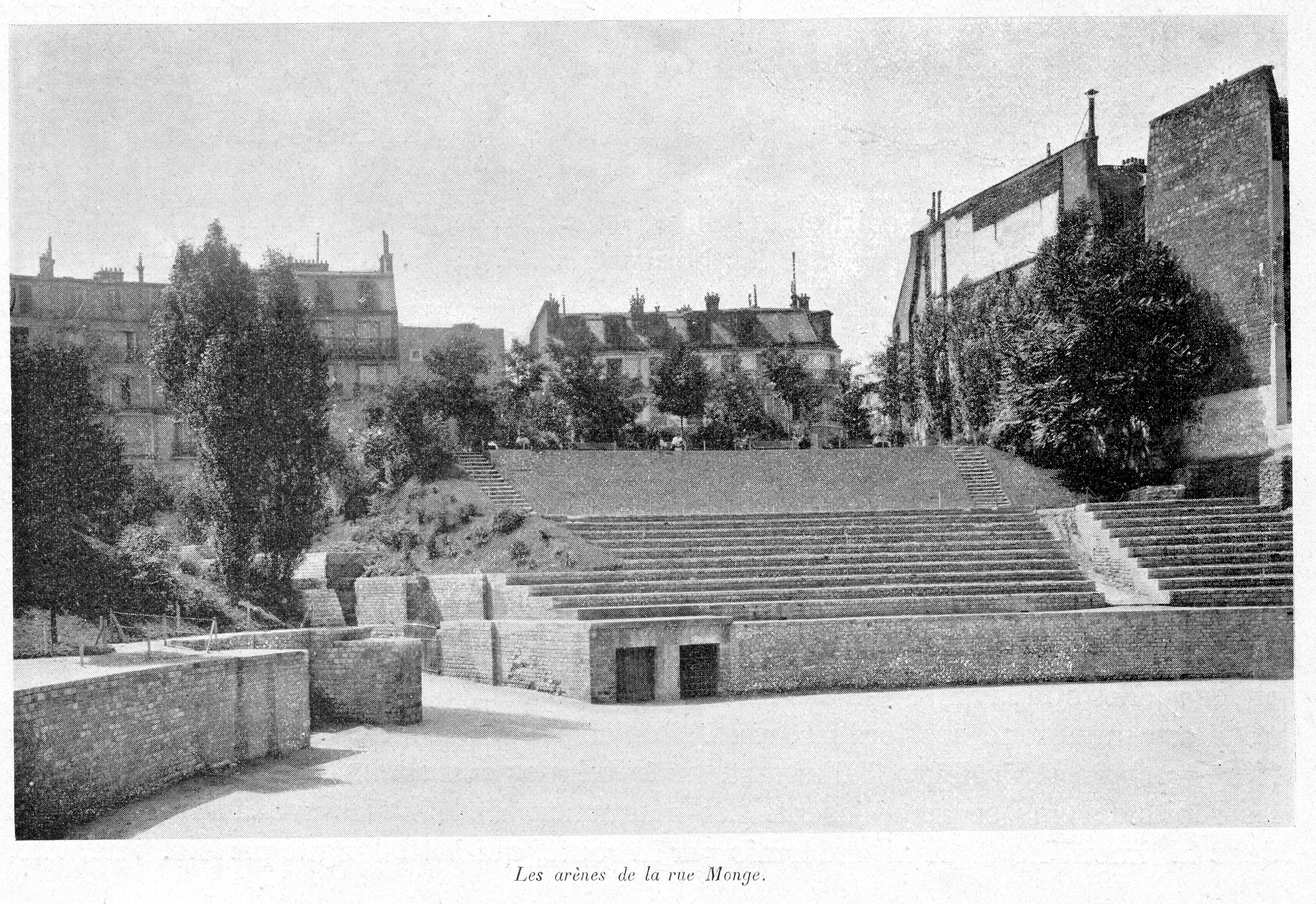 Clément Maurice Paris en plein air, BUC, 1897,Les arènes de la rue Monge